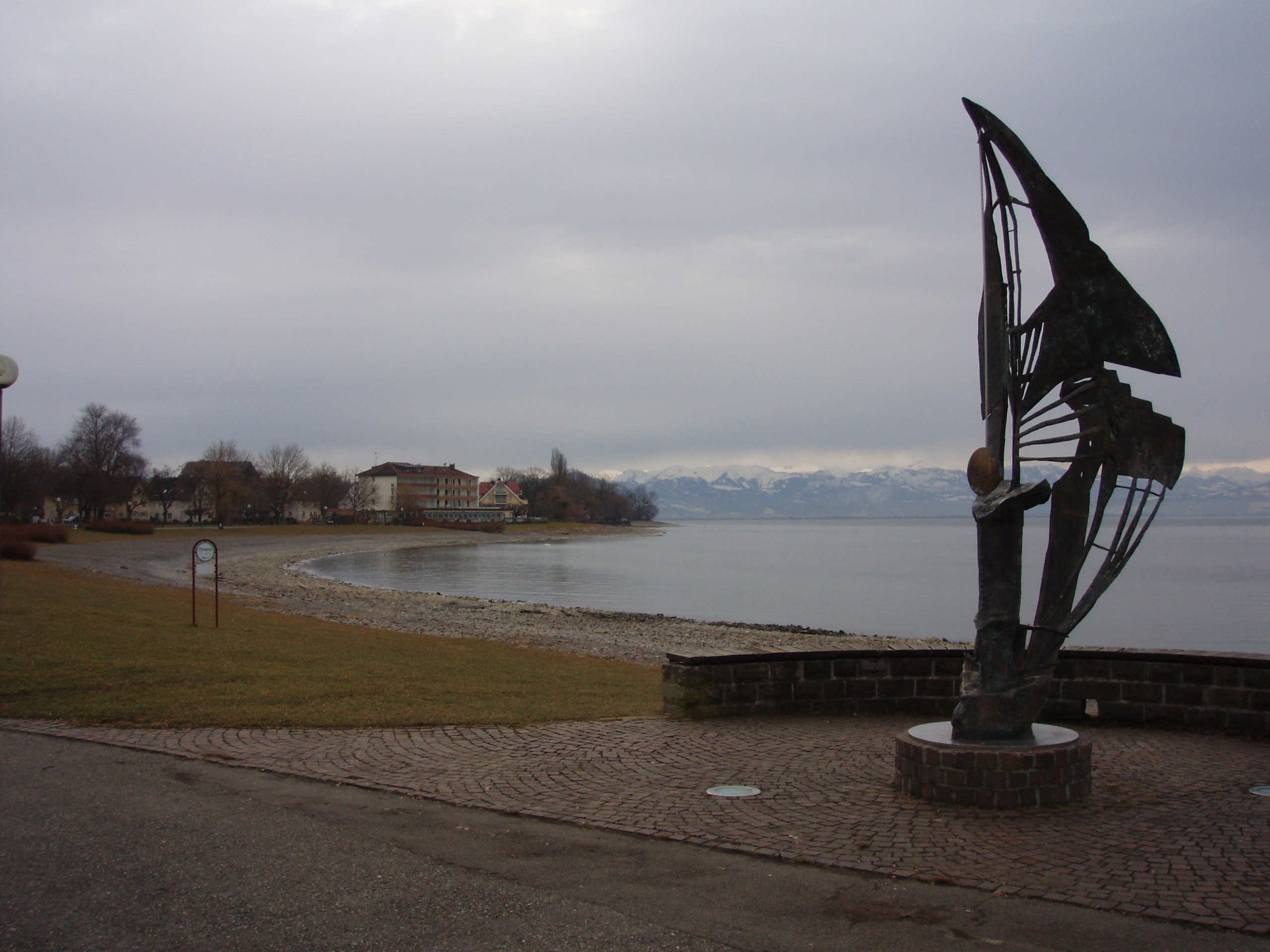 Pendelkunstwerk in Langenargen